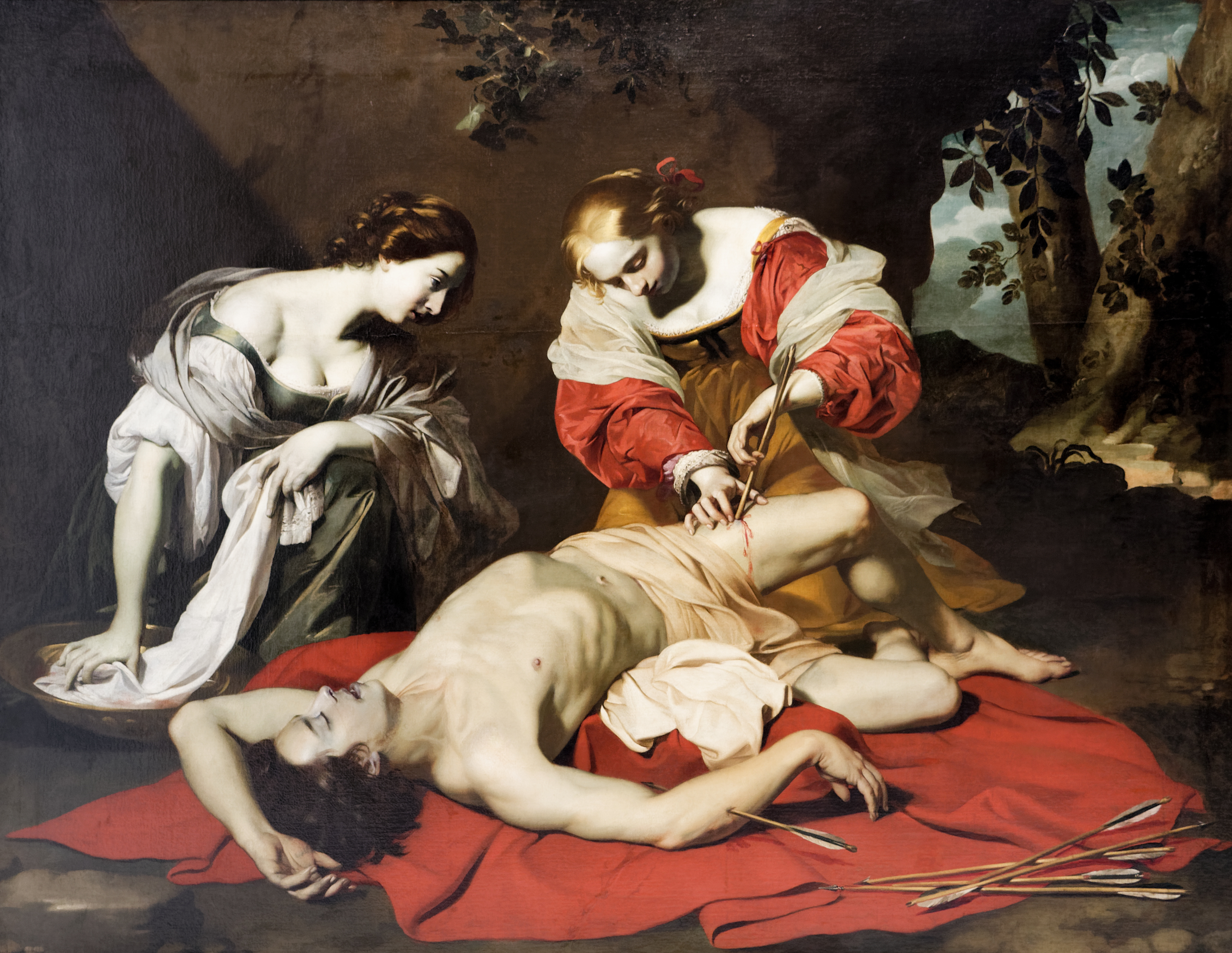 Nicolas Régnier - Saint Sébastien soigné par Irène et sa servante. Exposition "Nicolas Régnier l'homme libre" au Musée d'arts de Nantes (1er décembre 2017 - 11 mars 2018).